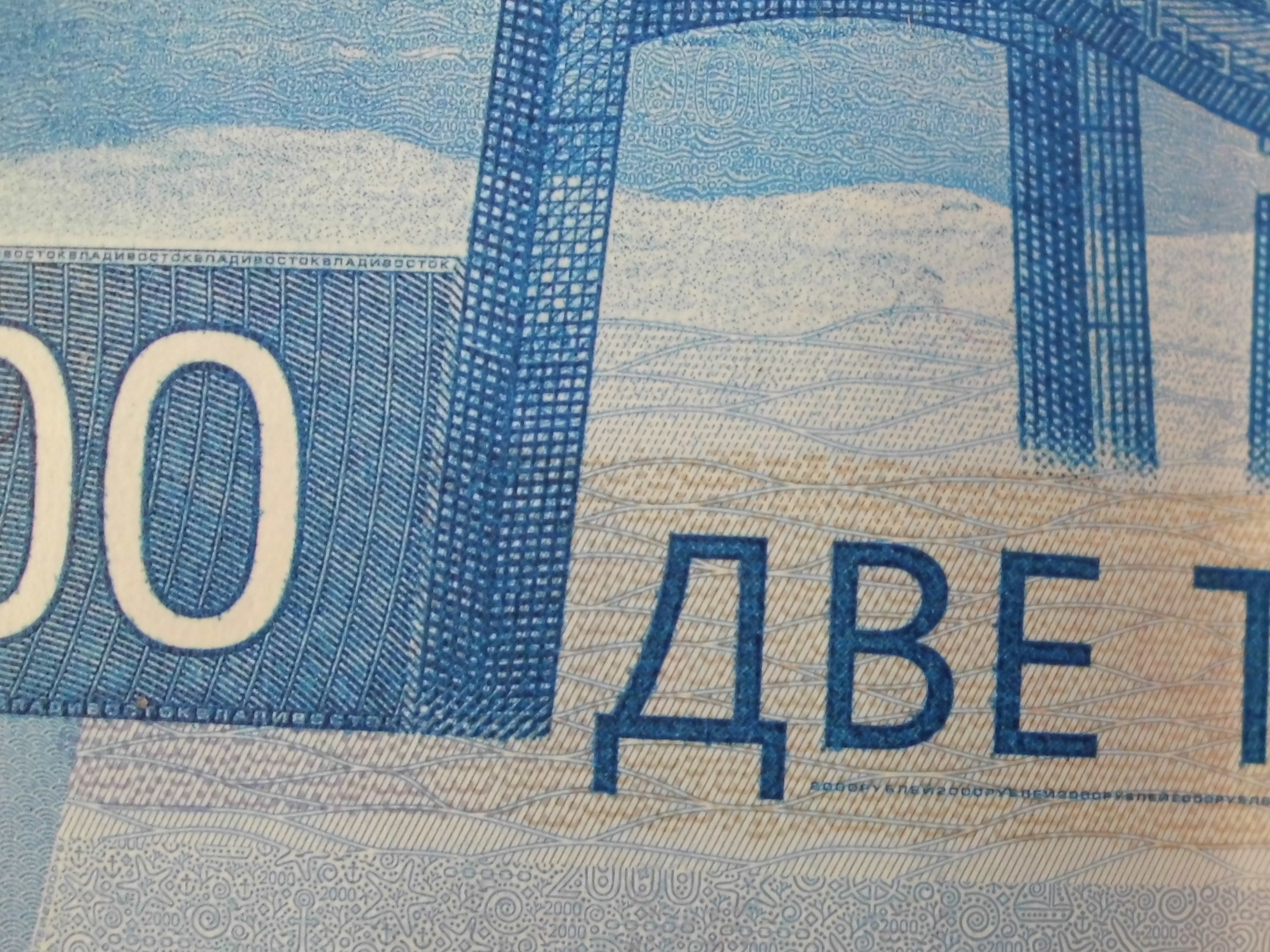 2000 российских рублей образца 2017 года. Аверс, посередине снизу. Микротекст (ВЛАДИВОСТОК, 2000РУБЛЕЙ, 2000) и микрорисунки на морскую тематику.